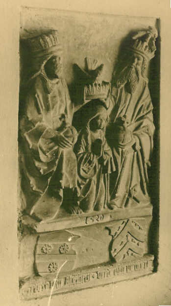 Gebhard XVII. von Alvensleben, Votivbild